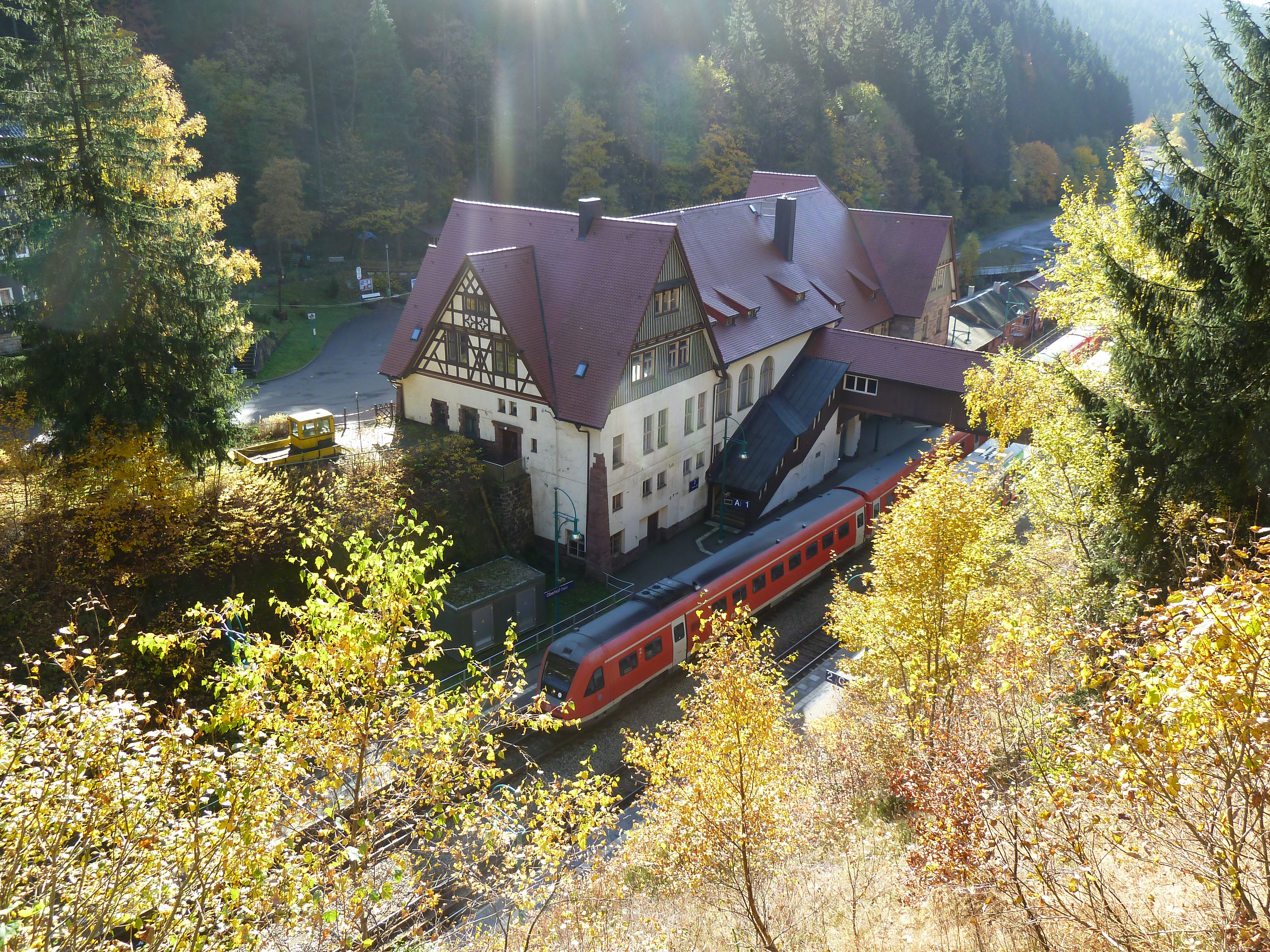 Bahnhof Oberhof von oben